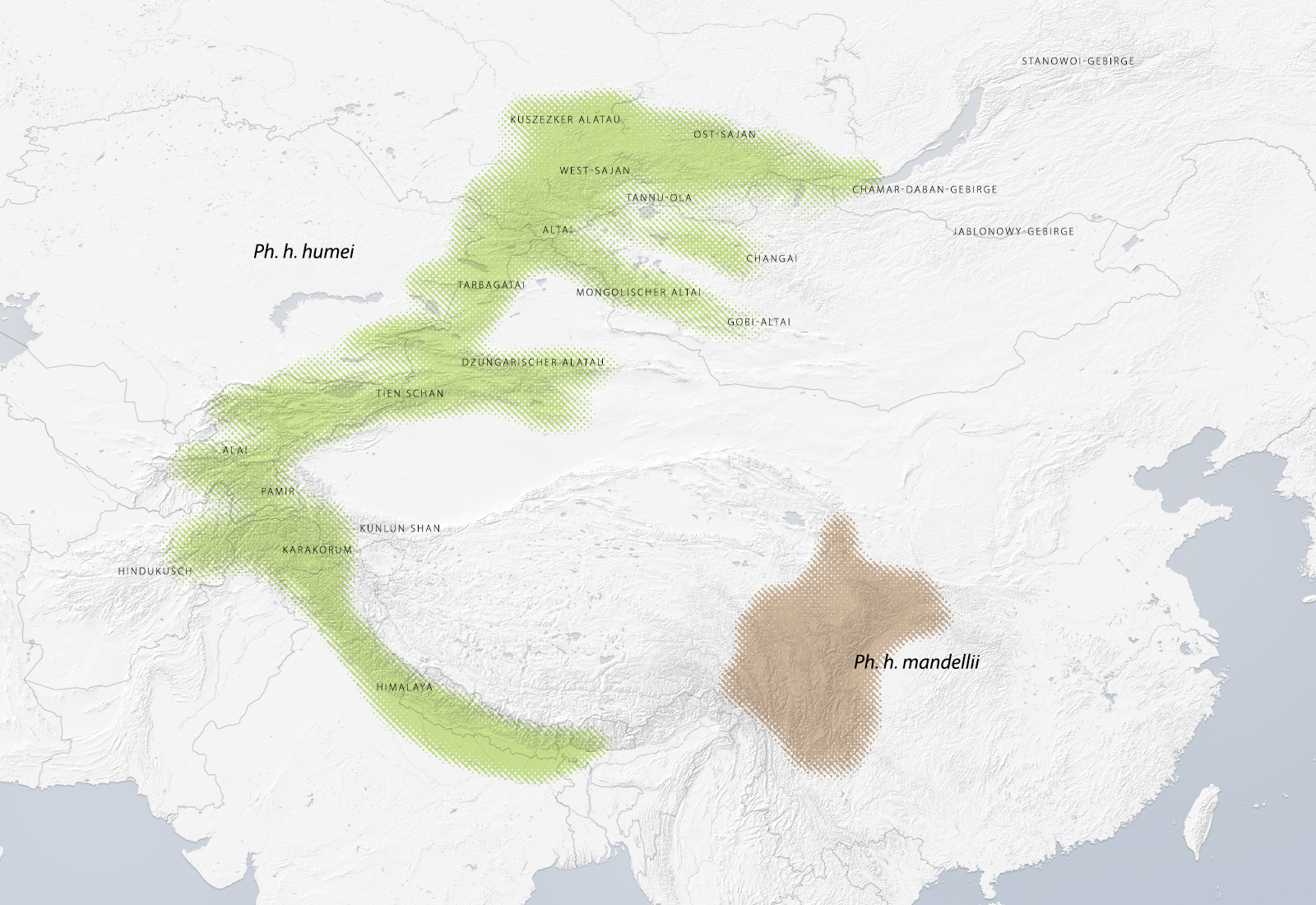 Brutverbreitung des Tienschan-Laubsängers und Gebirge Mittelasiens